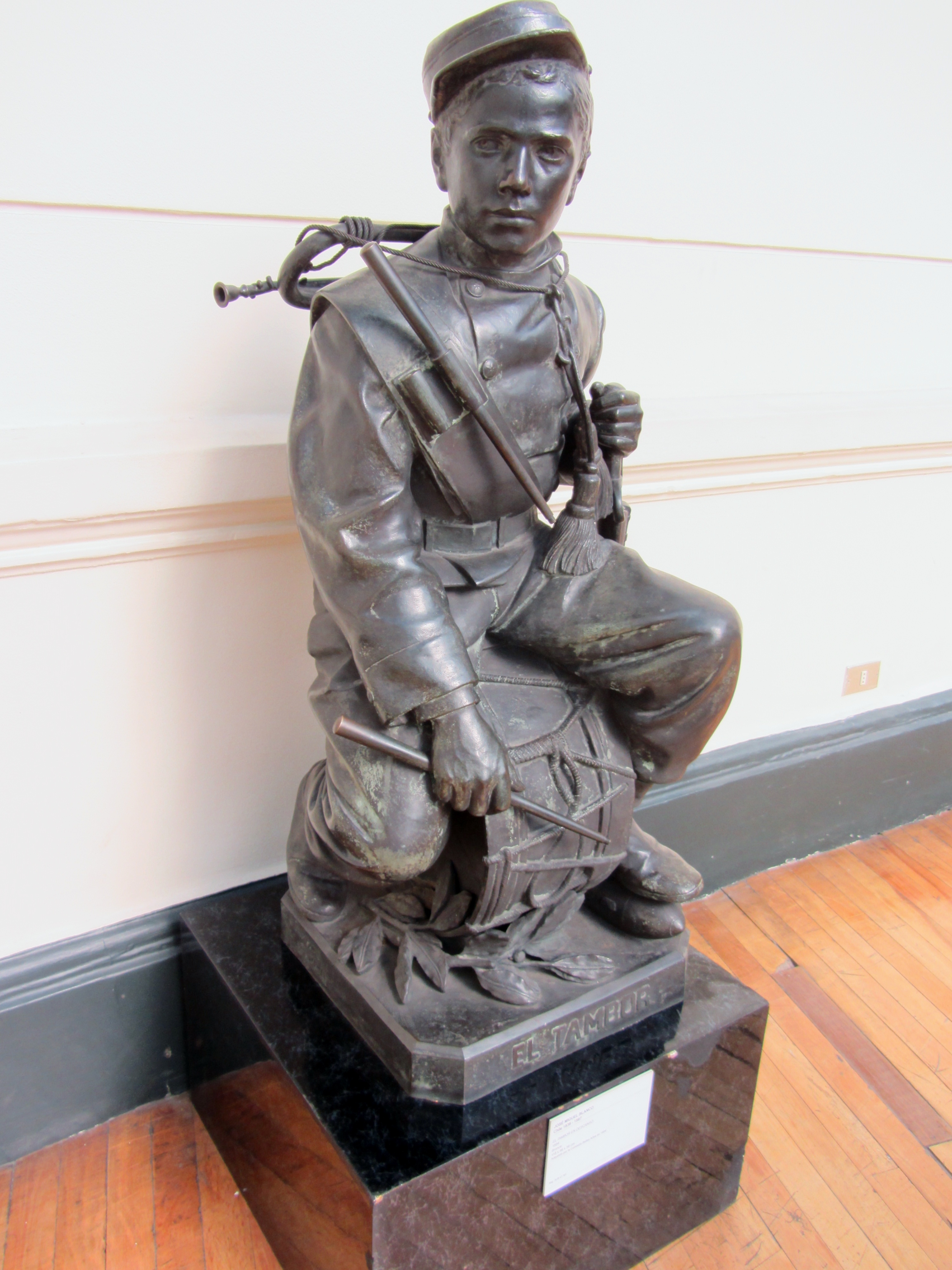 El tambor, escultura del chileno José Miguel Blanco ubicada en el Museo Nacional de Bellas Artes, Santiago de Chile.